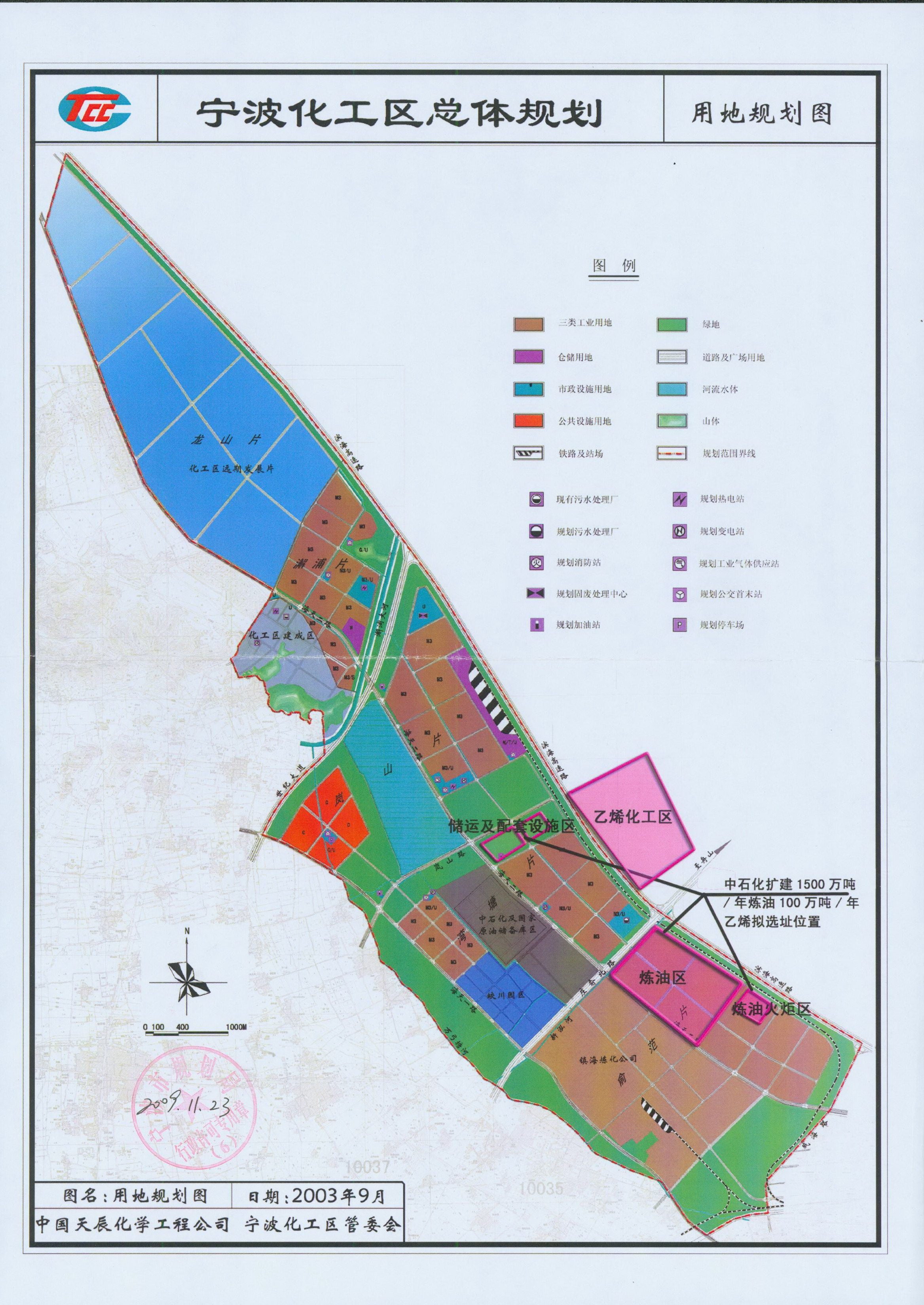 宁波石化经济技术开发区规划图，带有镇海炼化“一体化”项目选址